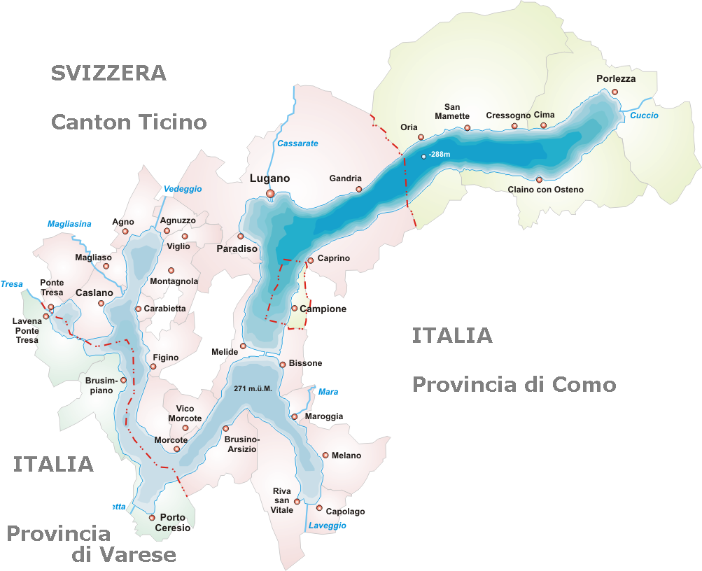 Lago di Lugano - Mappa. Rielaborata da de.wiki GFDL Bild:Karte Luganersee.png ja:??:Lago di Lugano-Mappa.png